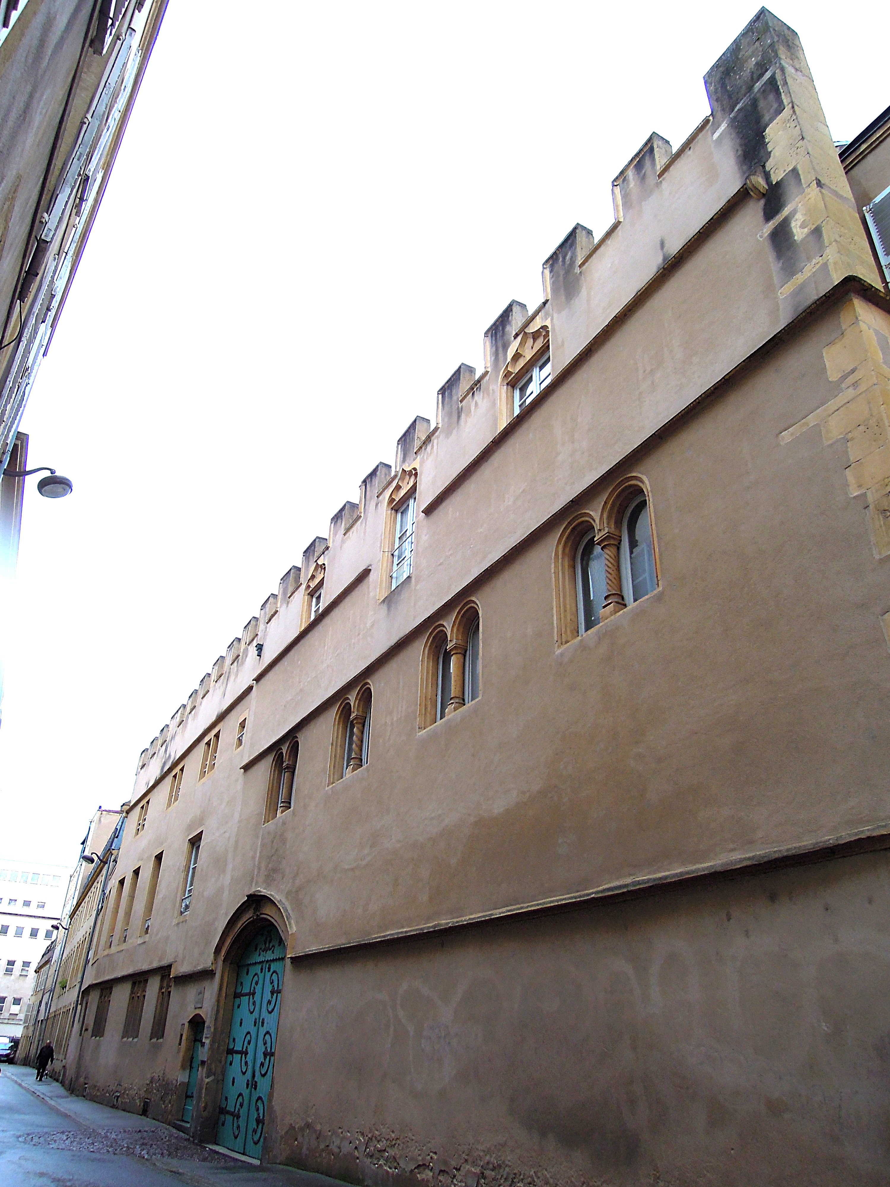 9, en Nexirue. Construit au 15ème s. Abrite aujourd'hui des logements sociaux et privatifs. .